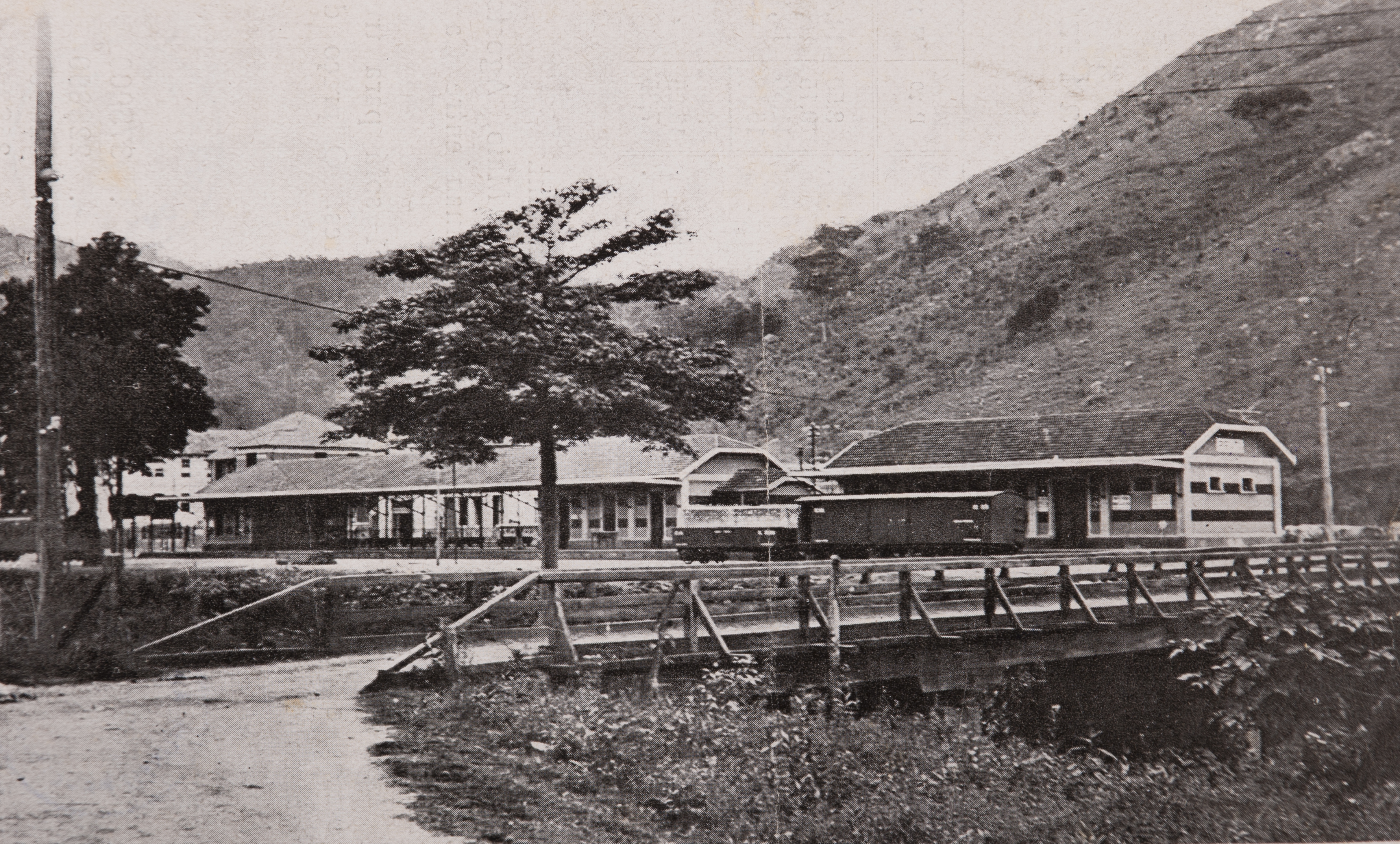 Obra que integra o acervo do Museu Paulista da USP. Coleção João Baptista de Campos Aguirra.